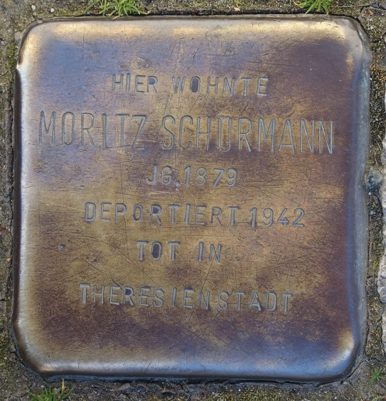 Stolperstein in Soest Thomästraße 63, Moritz Schürmann